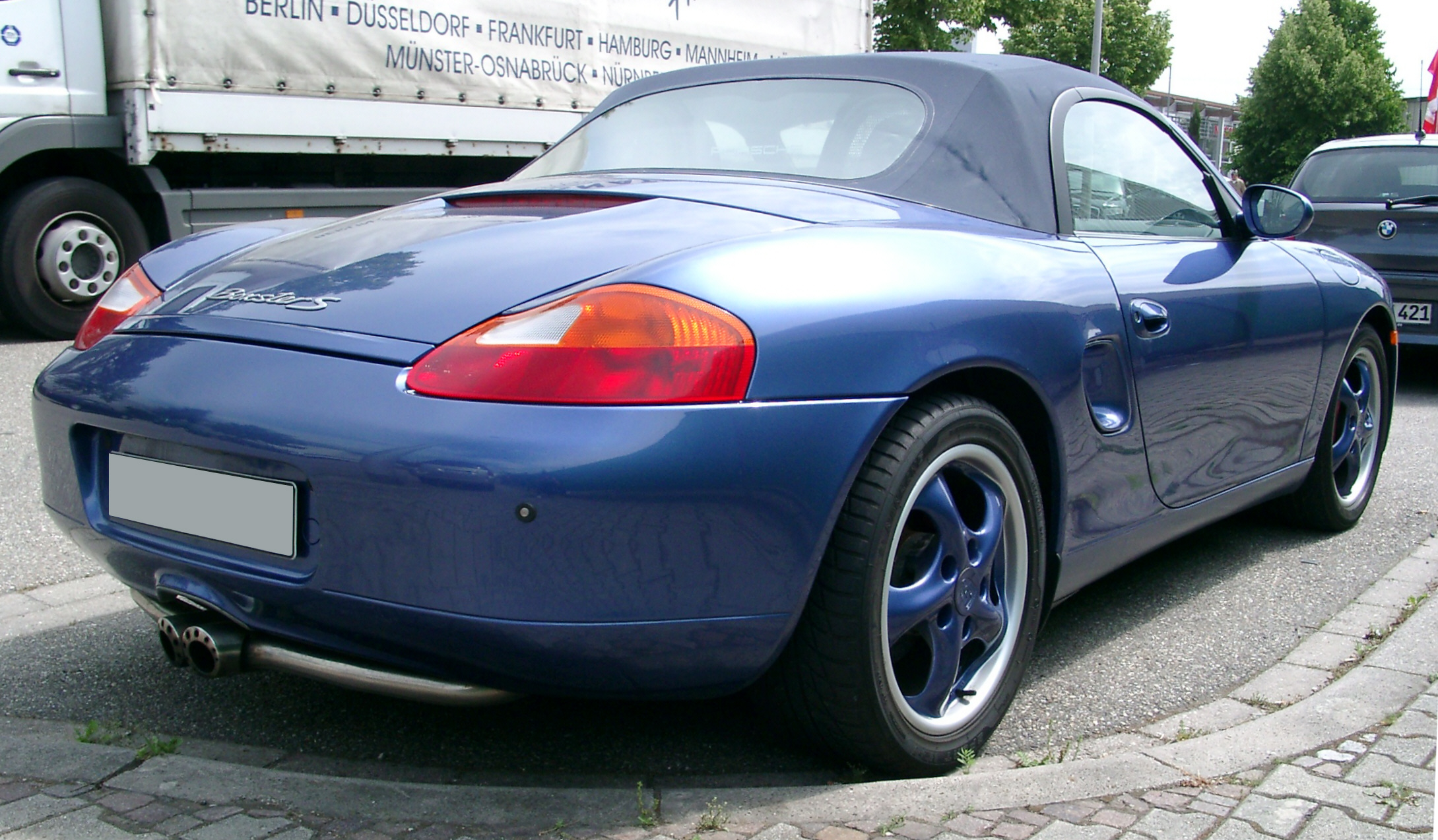 Porsche 986 Boxster